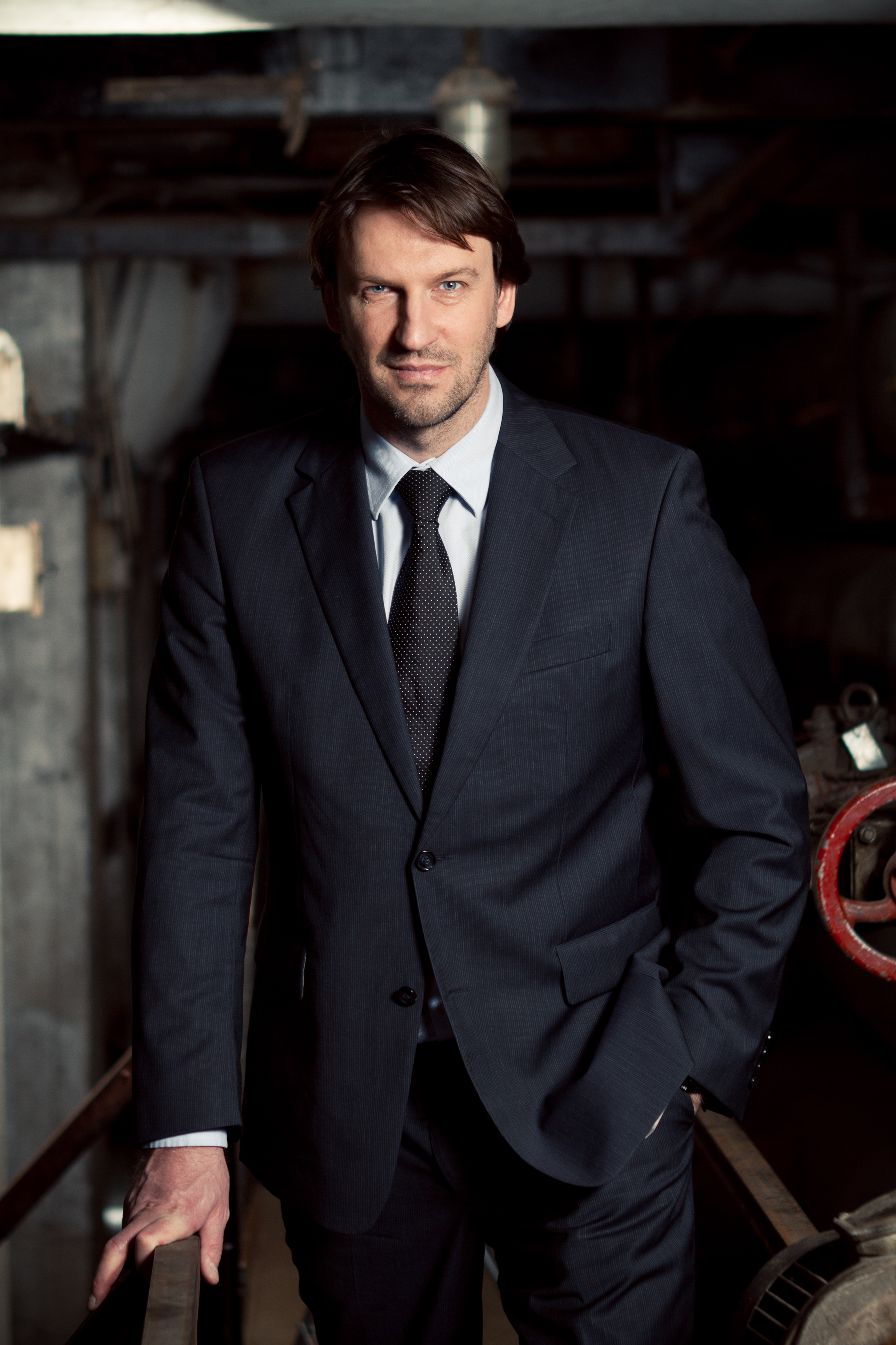 Margo Külaots